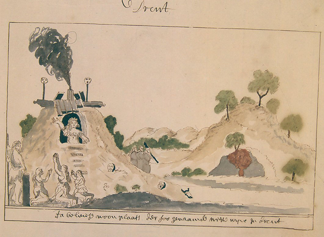 Beschrijving van het Landschap Drente, met Afbeeldingen der voornaamste Huizen